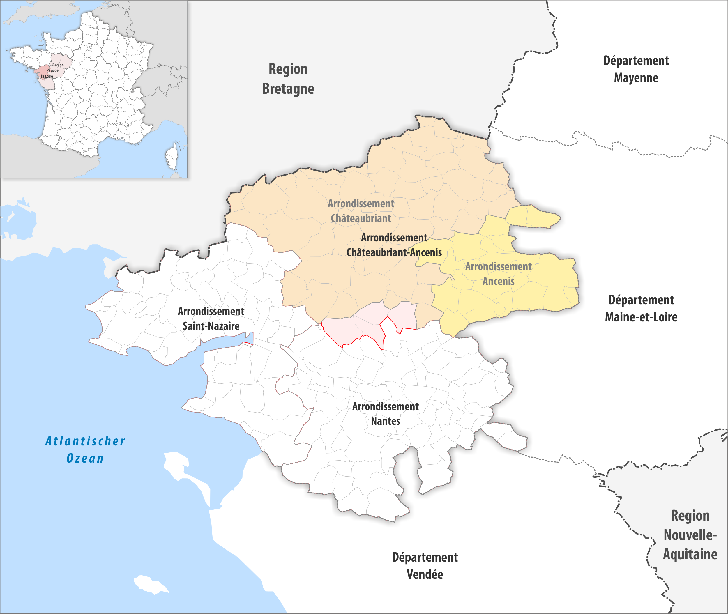 Arrondissements Anpassungen auf 2017 im Departement Loire-Atlantique